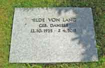 Die Grabstätte von Hilde von Lang auf dem Friedhof in Reinbek in Schleswig-Holstein.